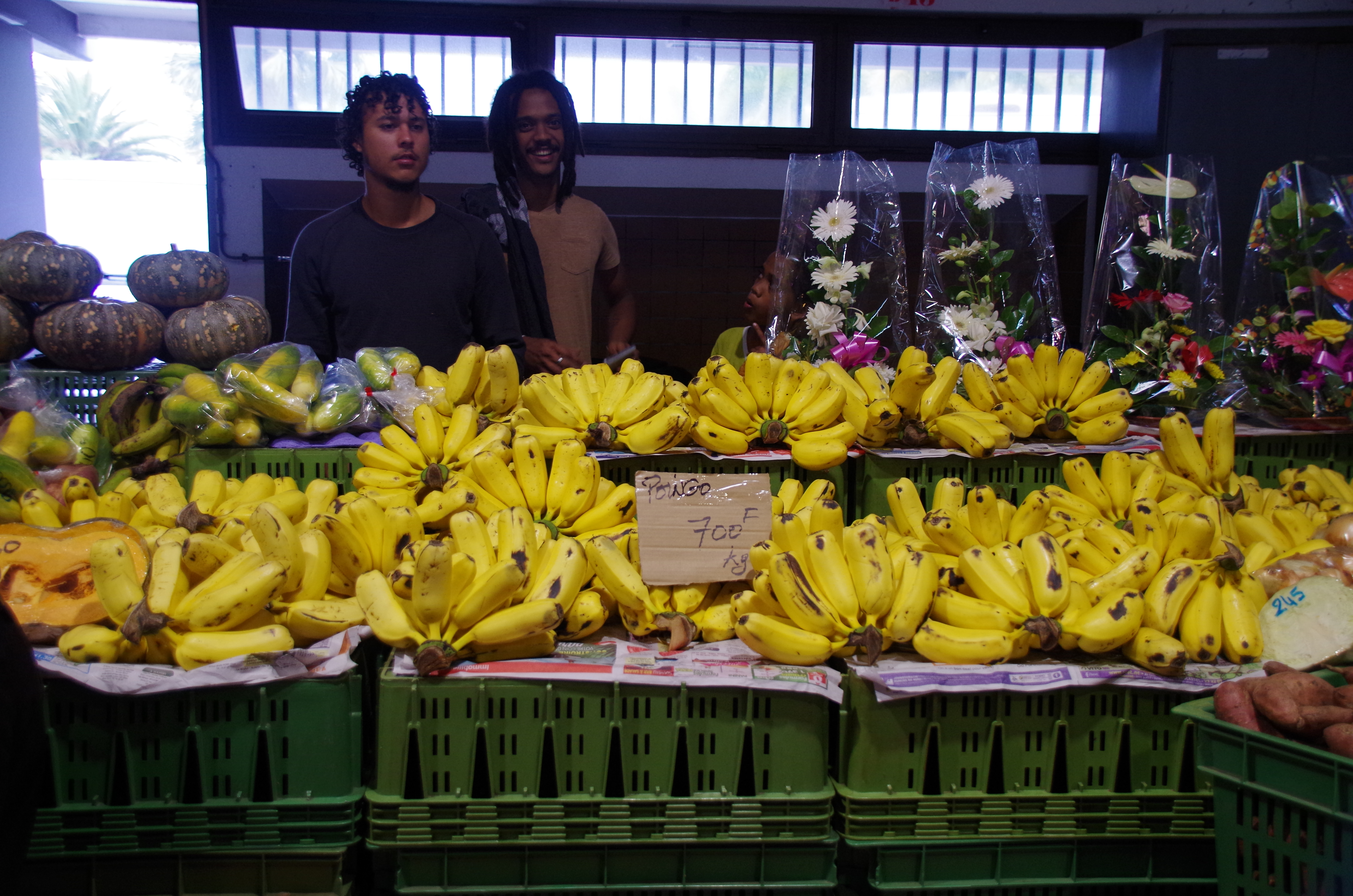 Nouméa Markt